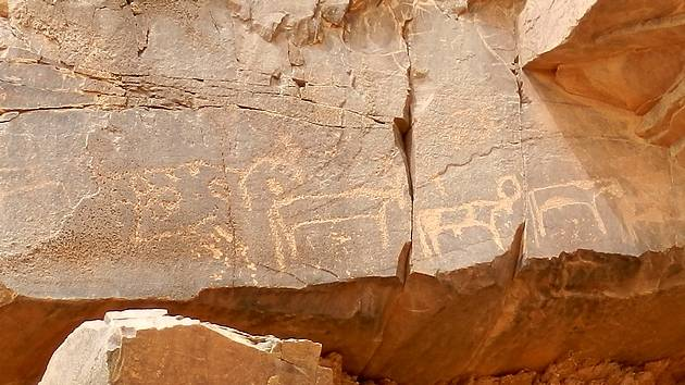 Marokko Amtoudi Felsgravur